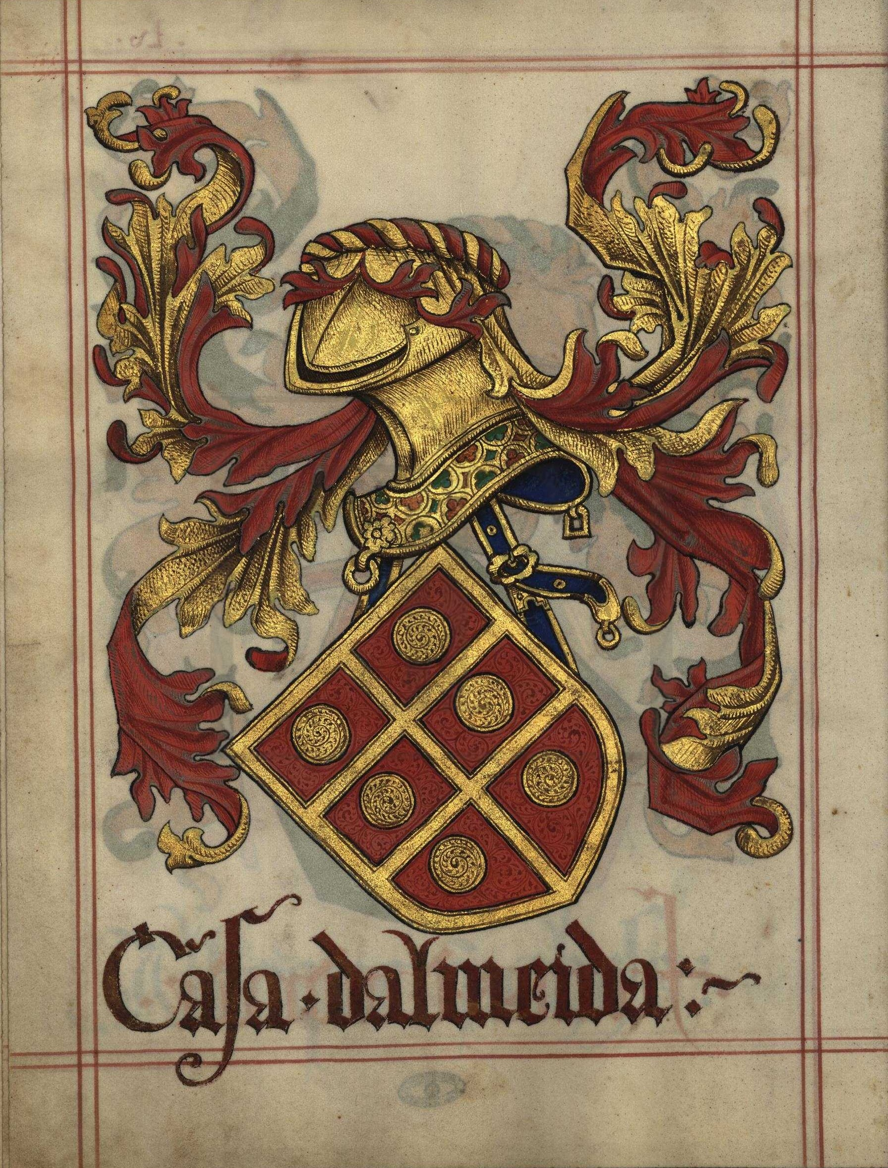 Livro do Armeiro-Mor, Almeida (fl 55v )